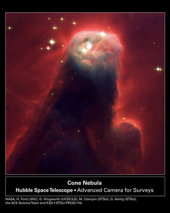 Nébuleuse du cône (nébuleuse en émission), zone de formation stellaire. Responsable scientifique de l'observation : H. Ford Crédit : NASA et Space telescope institute. Crédit complet : NASA, H. Ford (JHU), G. Illingworth (UCSC/LO), M.Clampin (STScI), G. Hartig (STScI), the ACS Science Team, and ESA Copyright notice : HST copyright (utilisation libre moyennant le crédit aux institution susnommées)